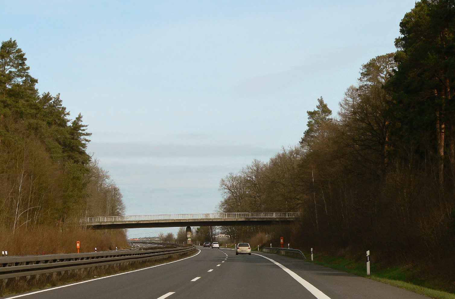 A 39 im Beienroder Holz